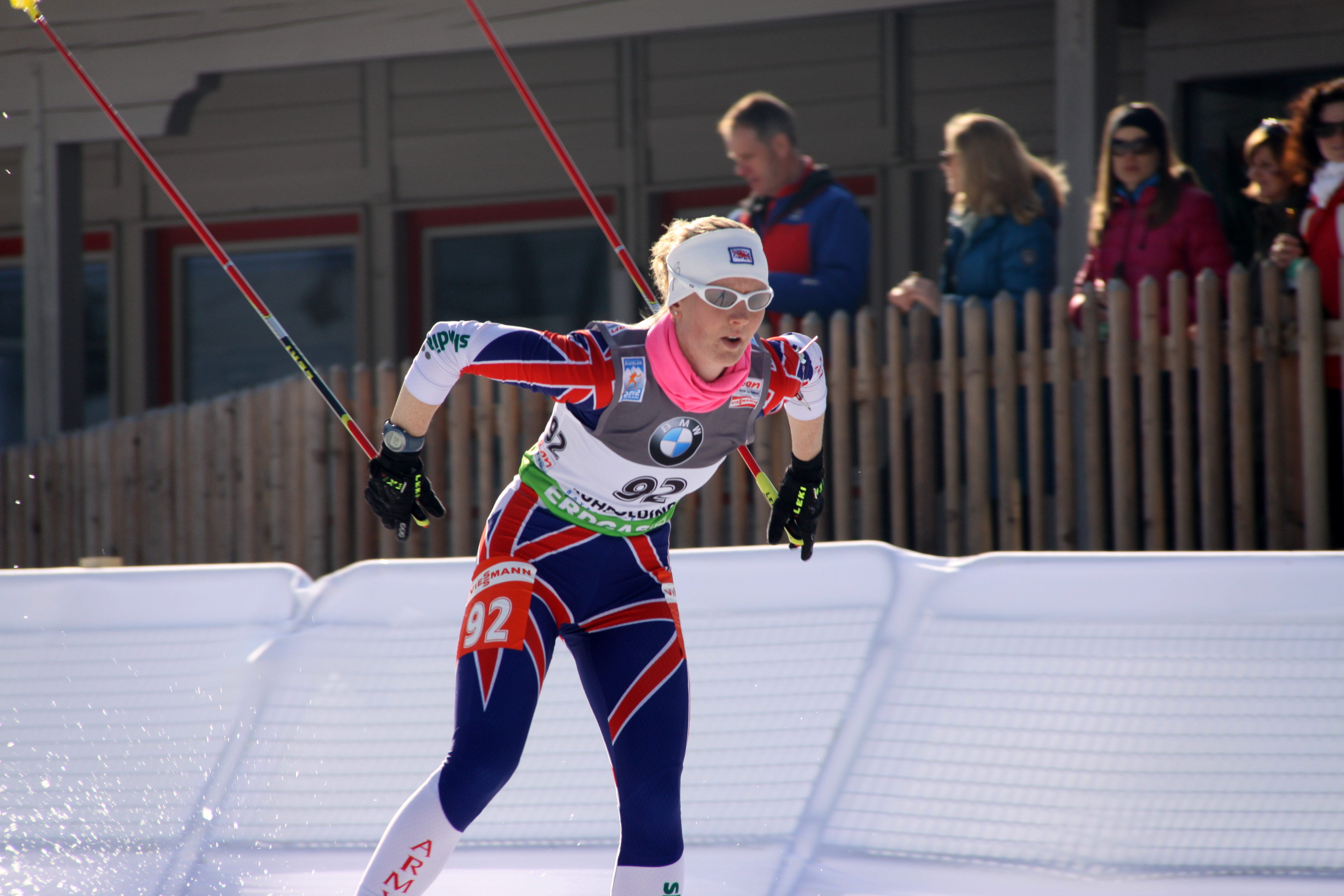 92 Amanda Lightfoot GBR - WM 2012 Ruhpolding